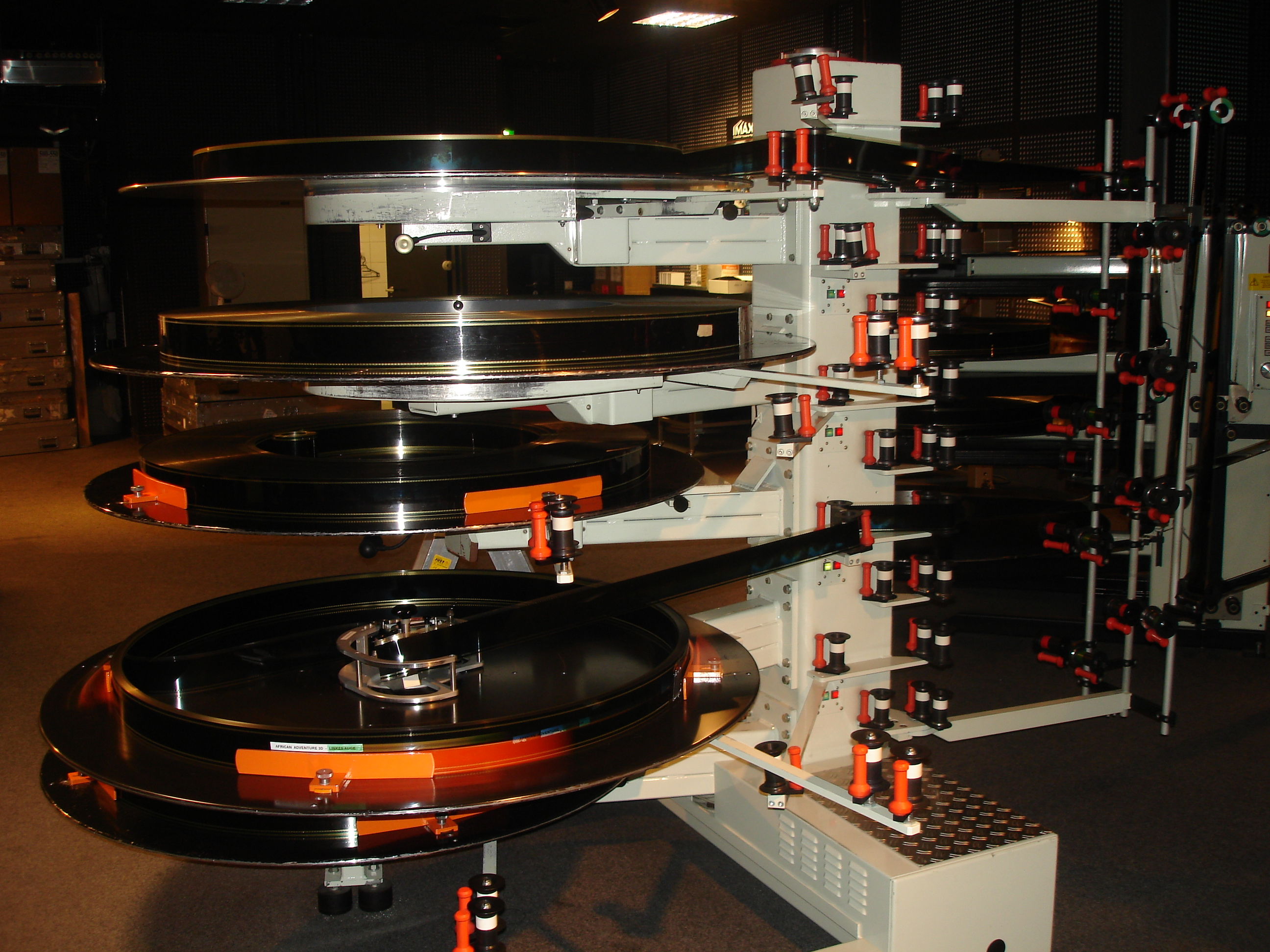 Filmteller für 70mm-Film in einem IMAX-Theater